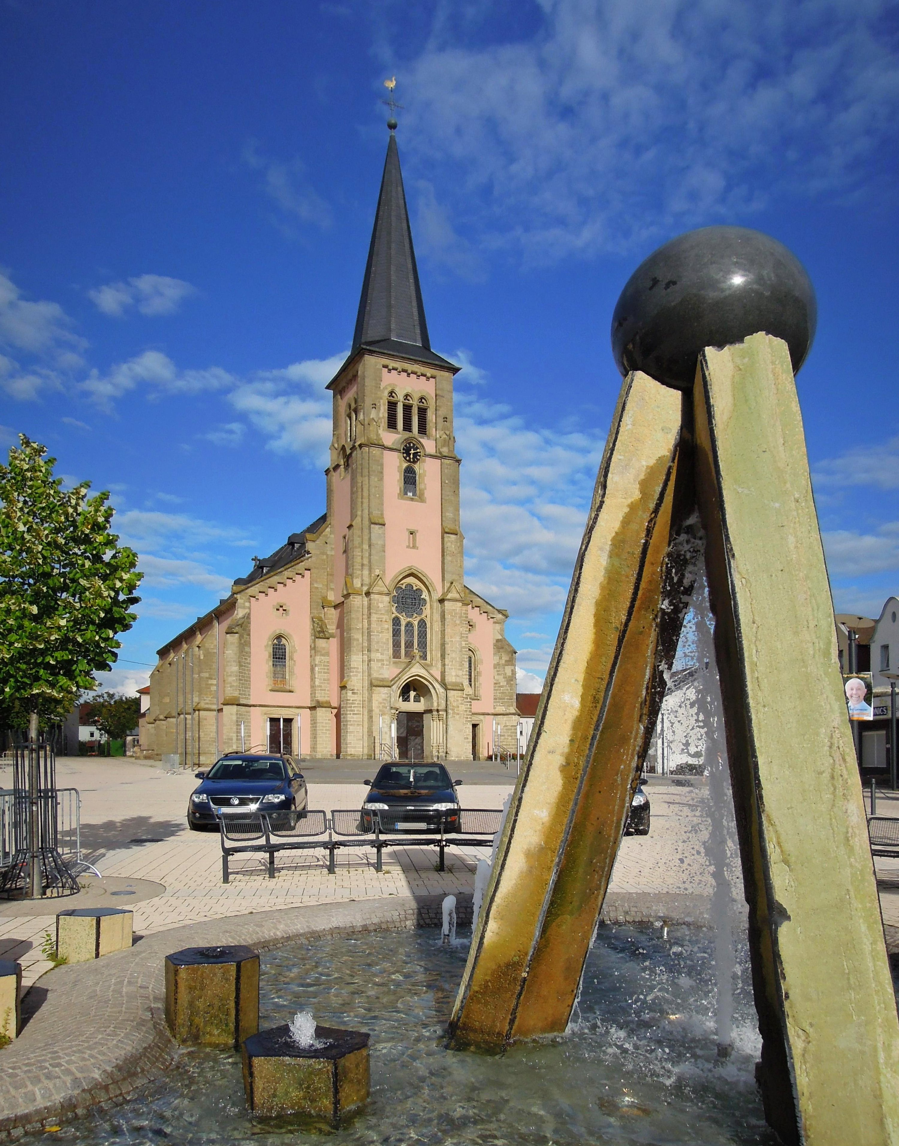 Pfarrkirche St. Maximin in Pachten (Einzeldenkmal)